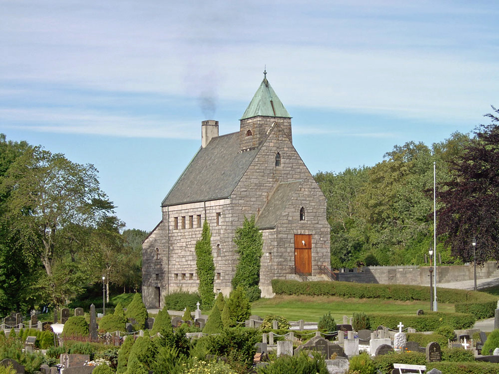 Kirkelandet, Krematorium Kristiansund